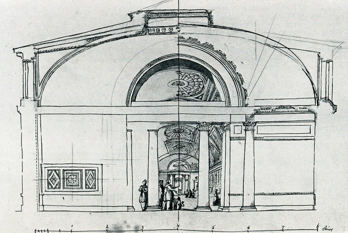 Картинна галерея проект: малюнок проект в 2 варіанти